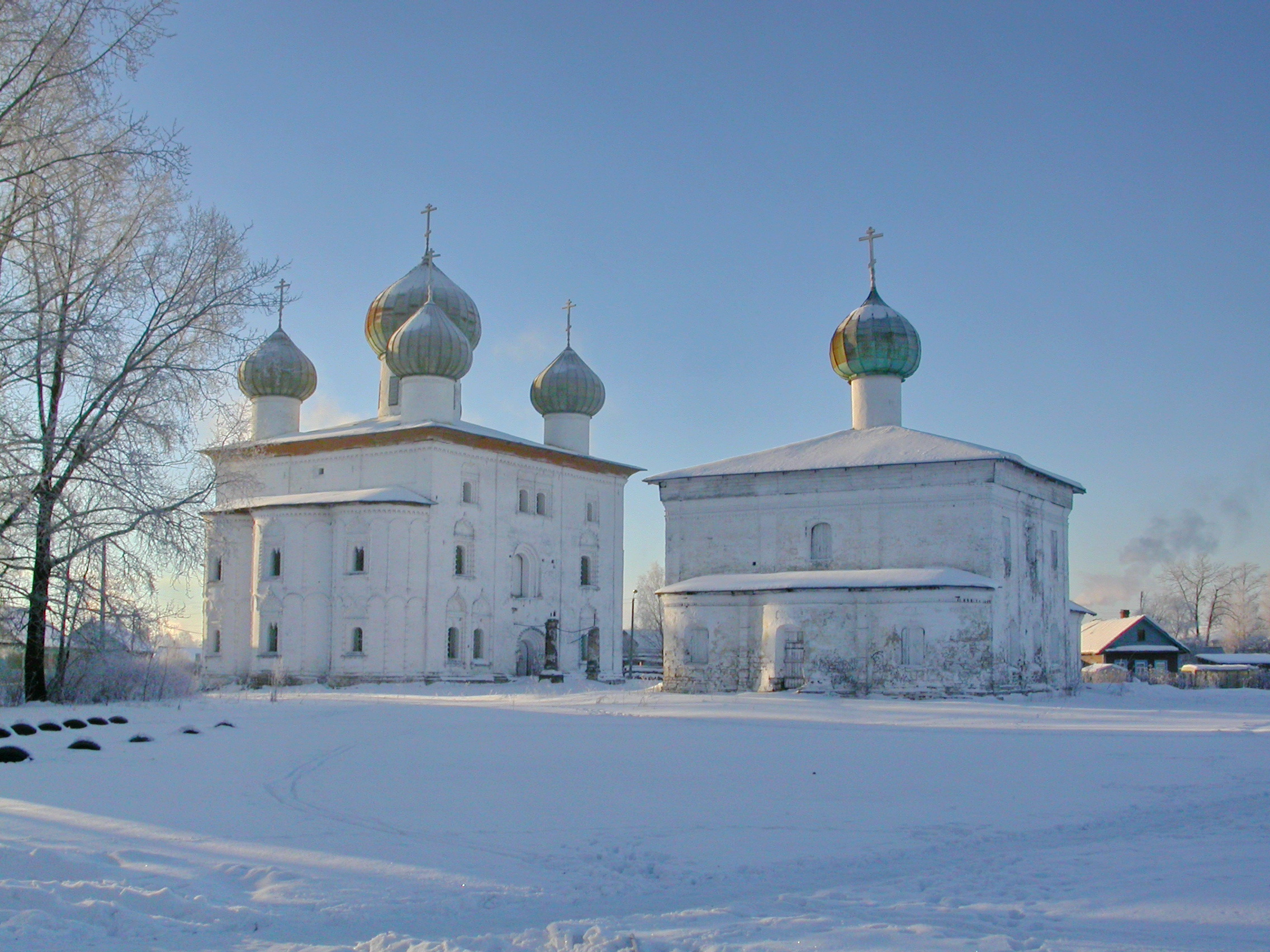 Никольская (Новая торговая) площадь города Каргополя